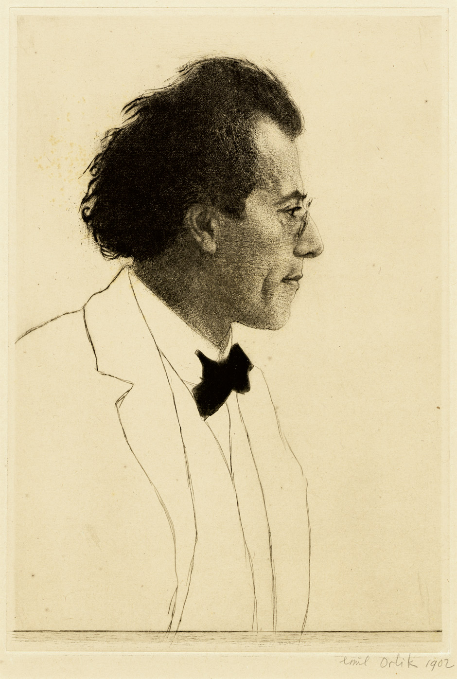 Gustav Mahler. Vernis mou und Kaltnadel in Dunkelbraun auf kräftigem gelblichem Velin. 29,2 x 20,1 cm (Plattenrand); 44 x 31,5 cm (Blattgröße). Signiert und datiert. 1902.